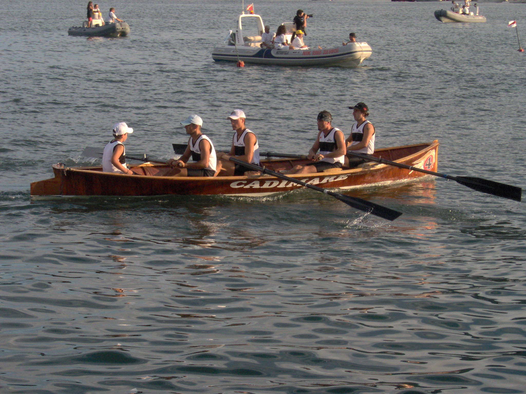 La borgata di Cadimare durante l'81° Palio del Golfo